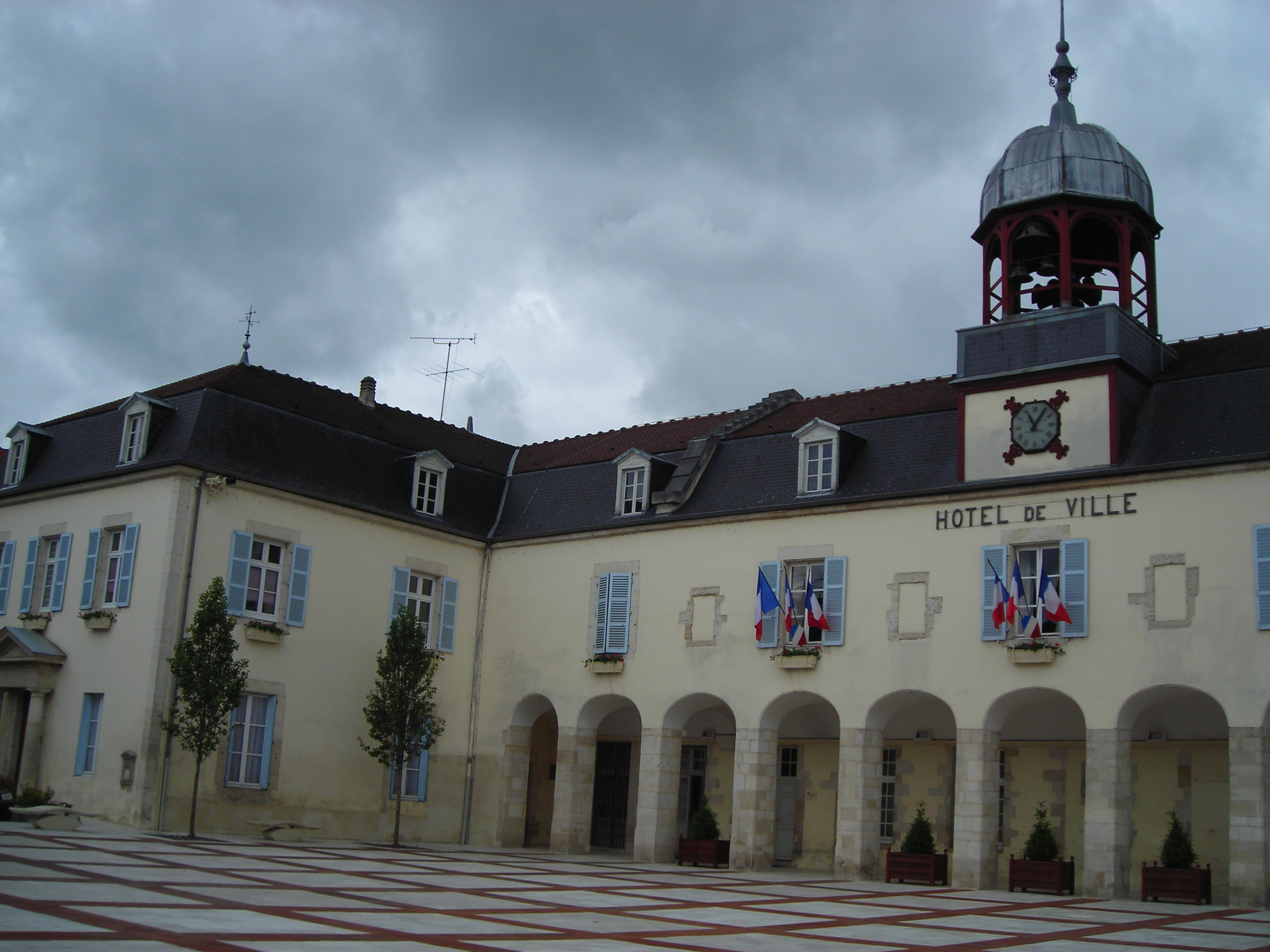 Mairie de Bar-sur-Aube en France